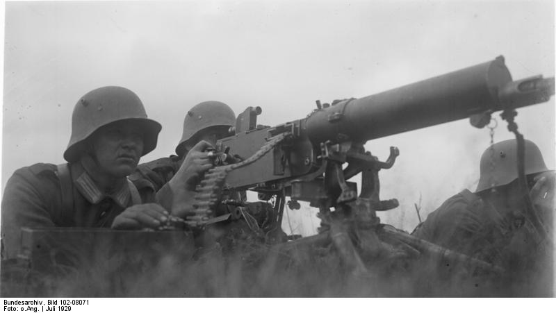 Die erste grosse Manöver-Übung der III. Division in Döberitz! fand unter Anwesenheit des Reichswehrministers Groener, des Chefs der Heeresleitung General Heye, sowie des amerikanischen Kommandeurs General W.D.Connor, dem Leiter der Heereskriegsschule der Vereinigten Staaten statt. Ein Maschinengewehrnest im Manövergelände.